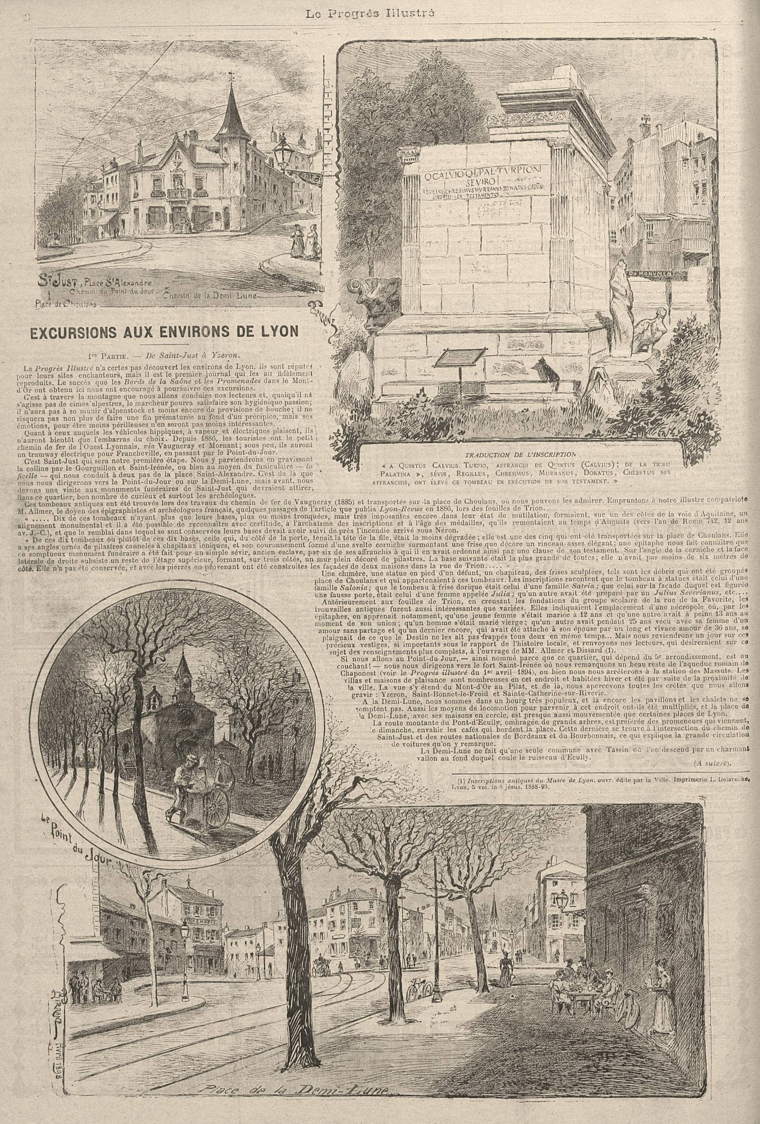 Une page du Progrès illustré (Lyon) du 1 mai 1898, page 8 - avec une gravure du Tombeau de Turpio